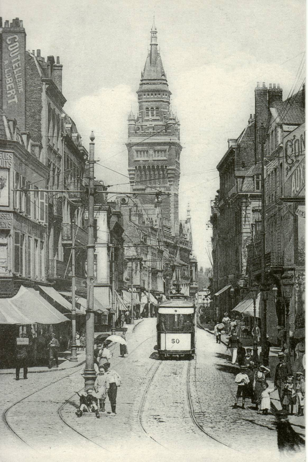 Carte postale ancienne éditée par Primset :DUNKERQUE - La rue de l'église